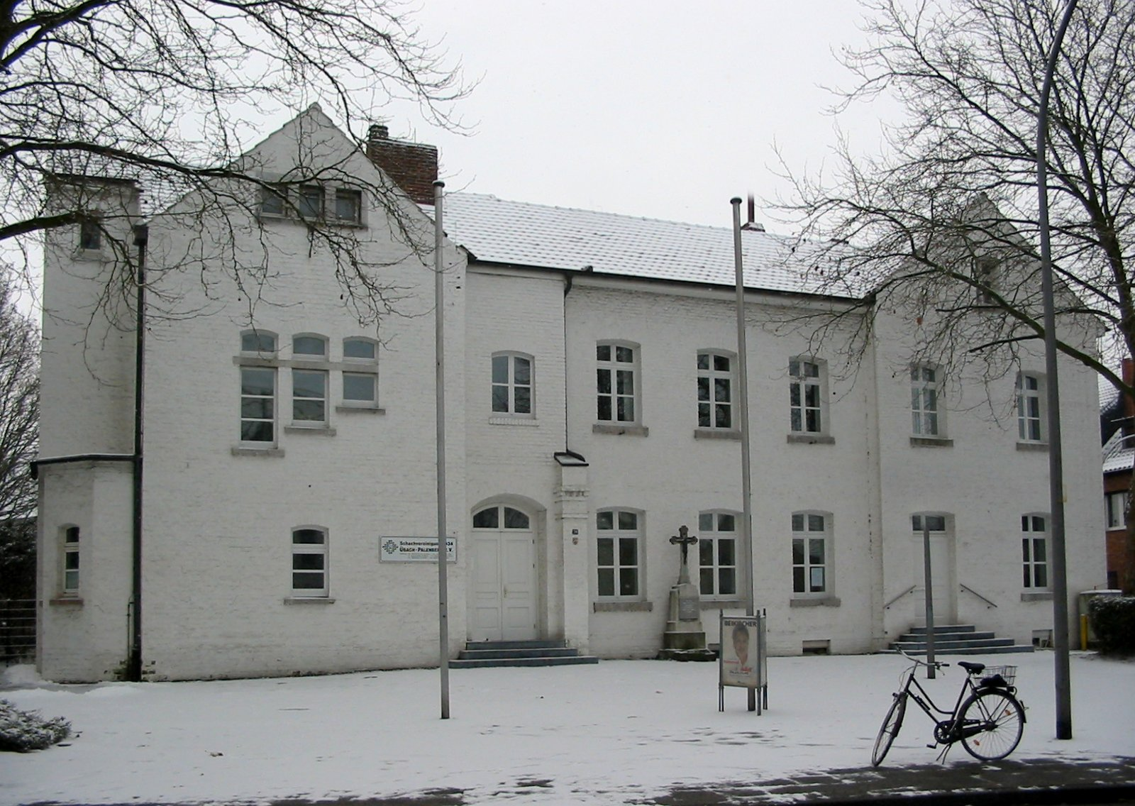 Übacher Tagungsräume